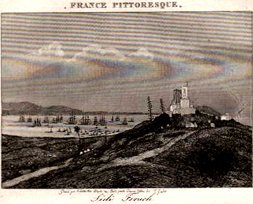 Gravure ancienne, Algérie. "Sidi Ferruch". 1835 (extrait de France pittoresque)